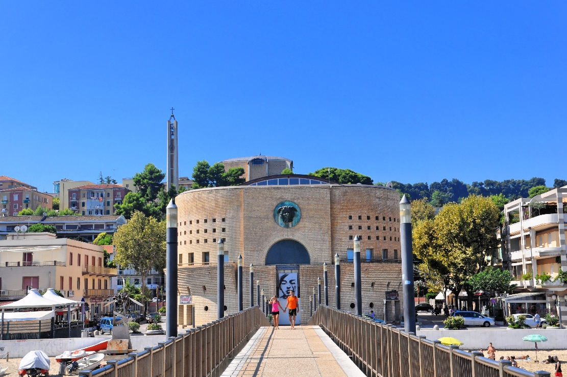 Francavilla al Mare 2014